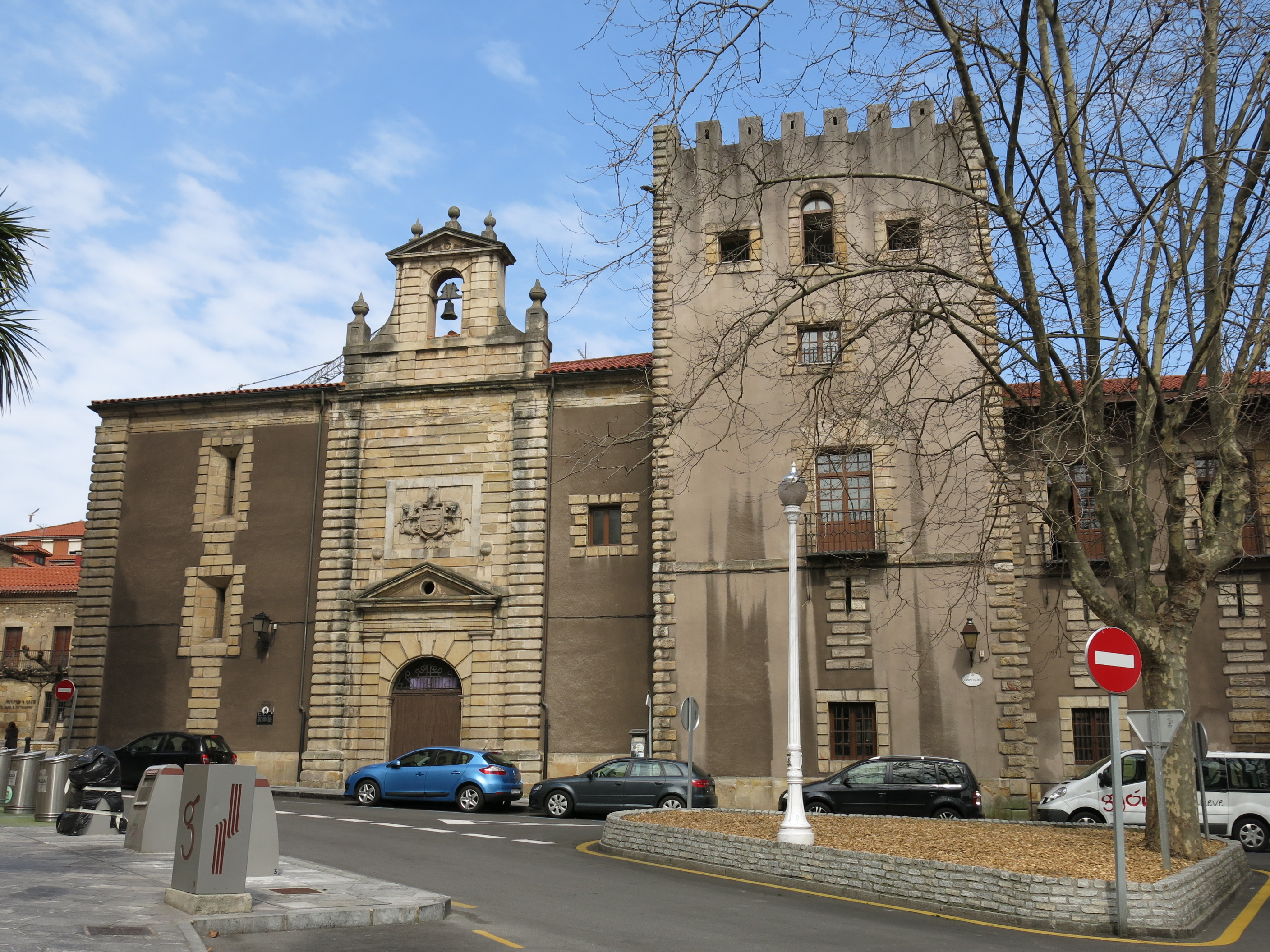 Conjunto Histórico Artístico El Barrio Viejo de Gijón